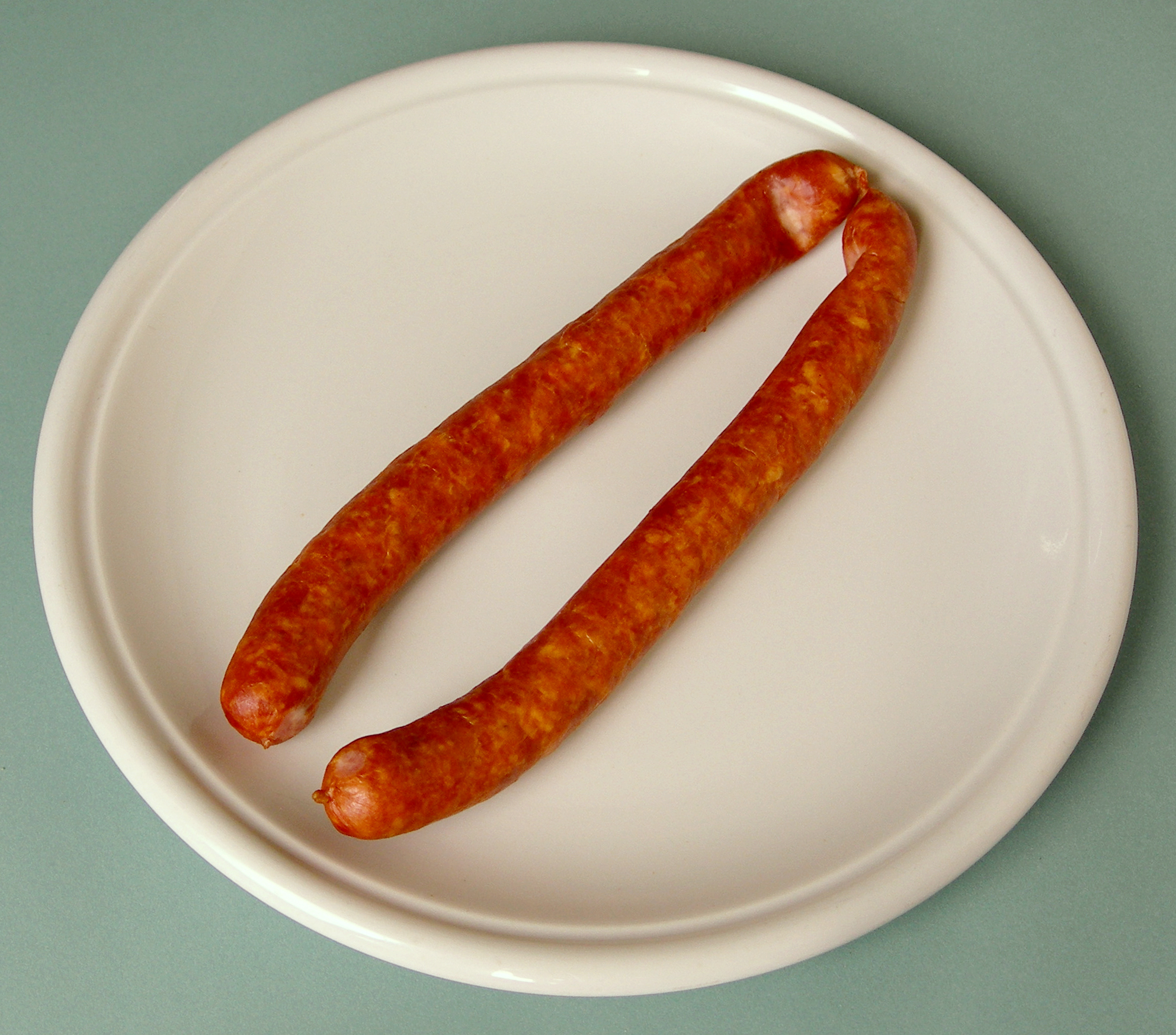 Berliner Schinkenknacker. Eigene Aufnahme